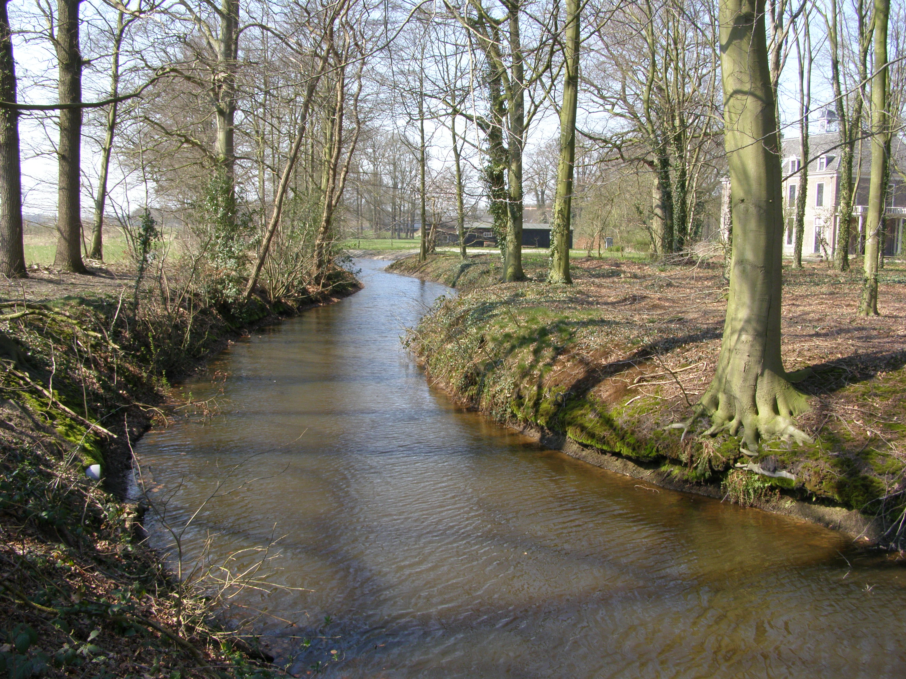 eigen werk